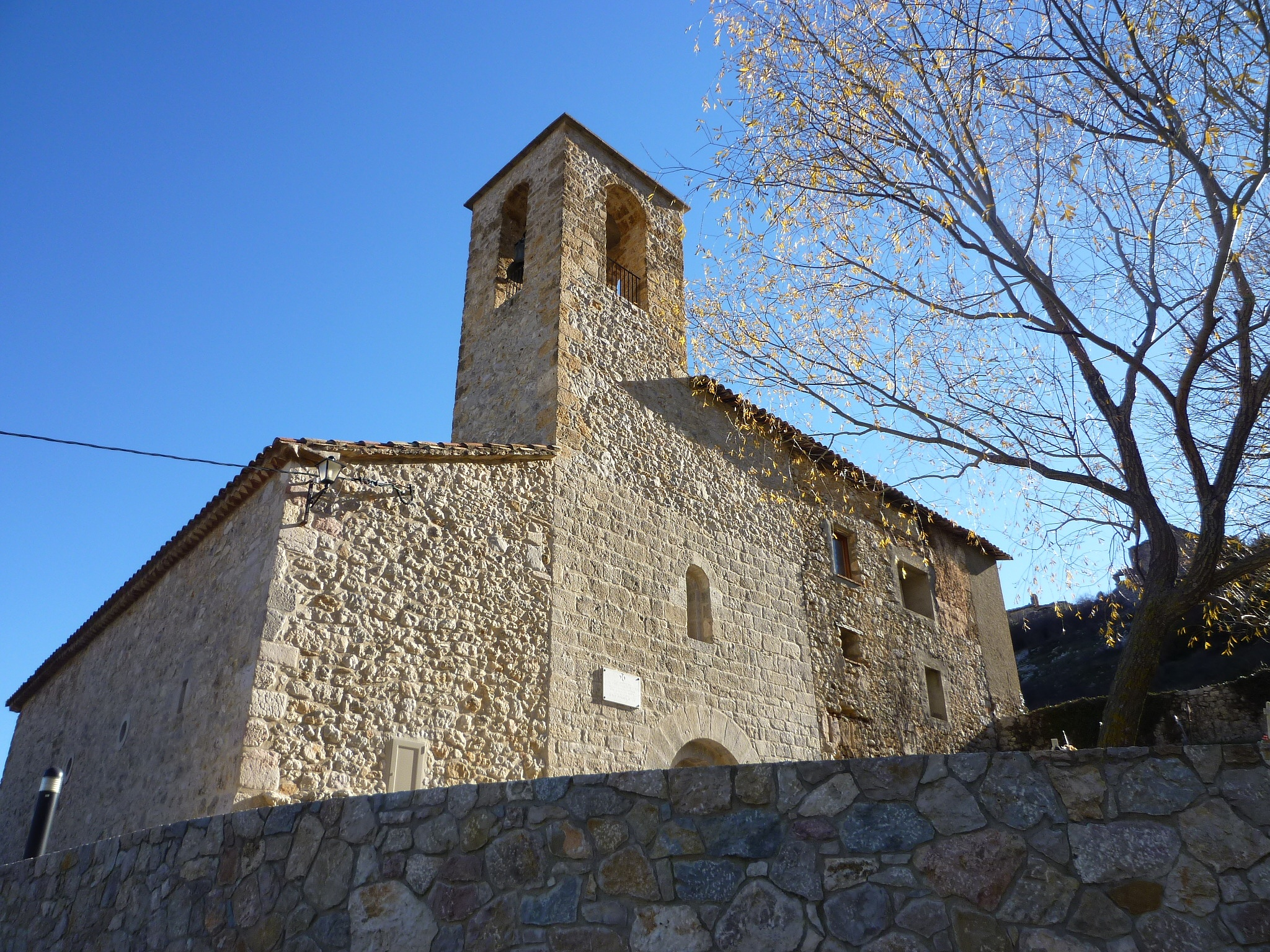 Església parroquial de Sant Martí de Cambrils (Odèn)